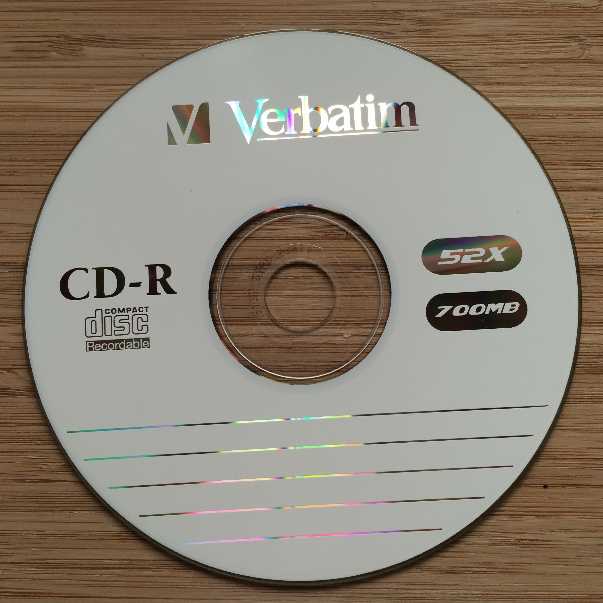 Přední strana CD